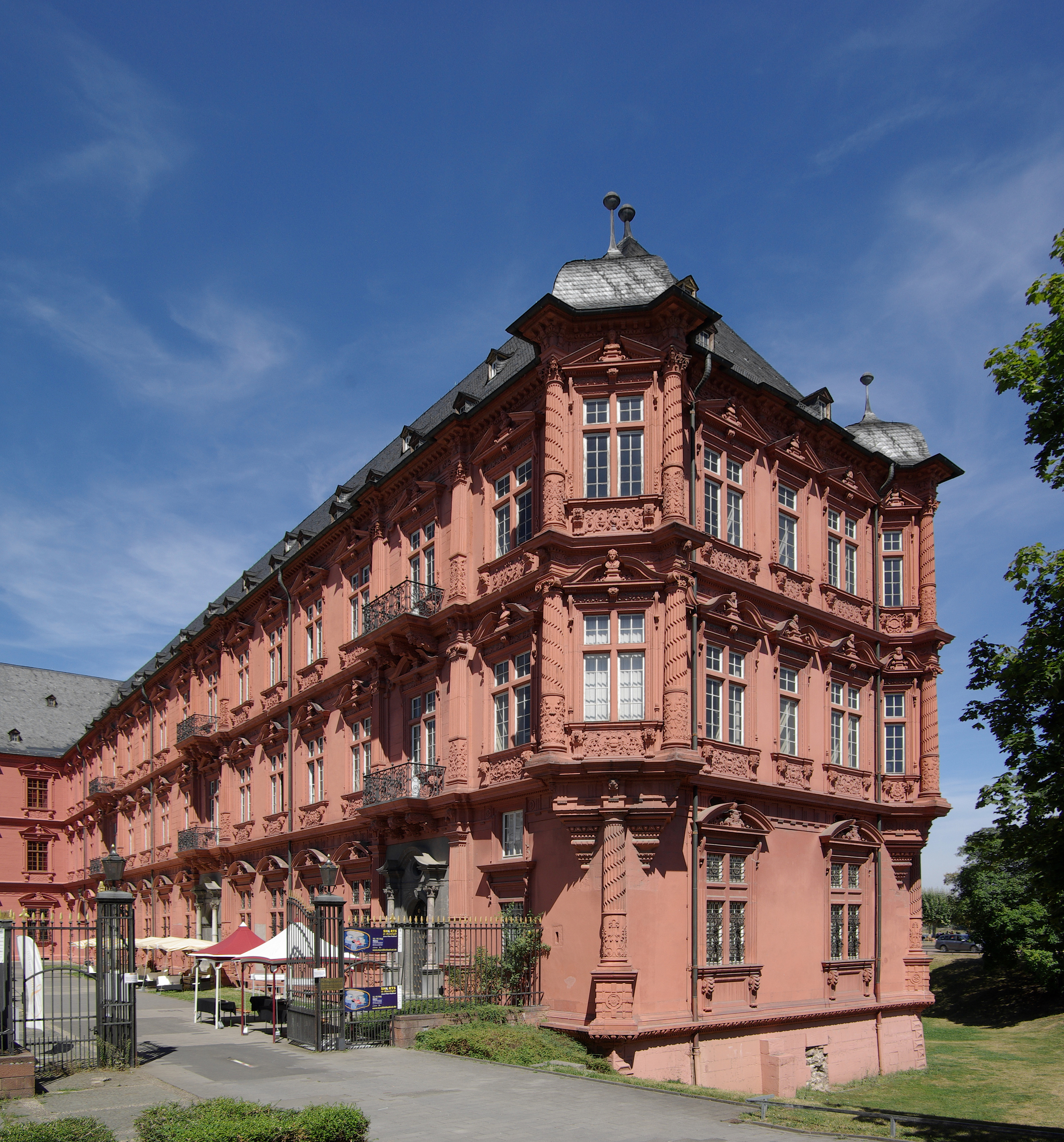 Mainz, Kurfürstliches Schloss, das Residenzschloss der Erzbischöfe von Süden